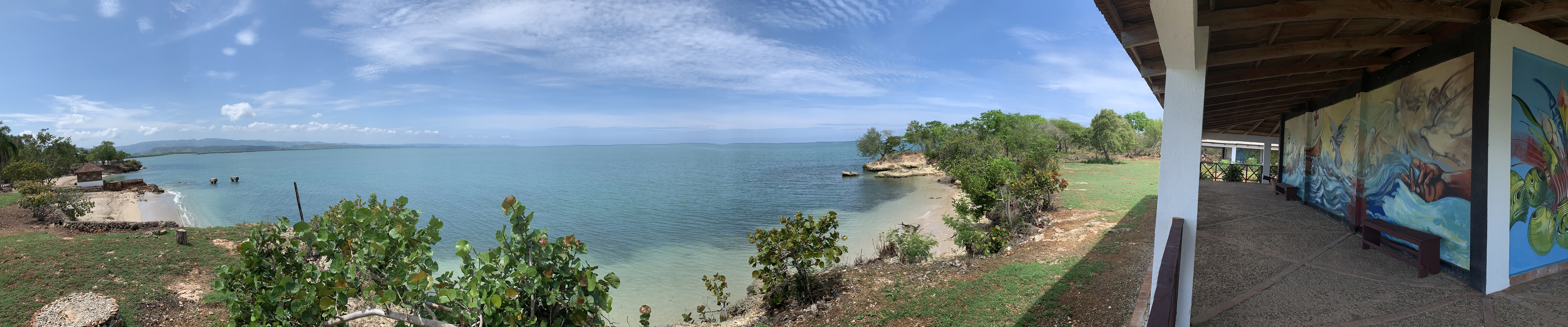 Vista panorámica de la ensenada del Parque Nacional Histórico y Arqueológico de La Isabela, Luperón, República Dominicana